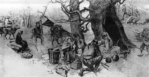 А. И. Гогиашвили. «Гурийцы, укрывшиеся в лесу». Карандаш. 1906. Музей искусств Грузинской ССР. Тбилиси.